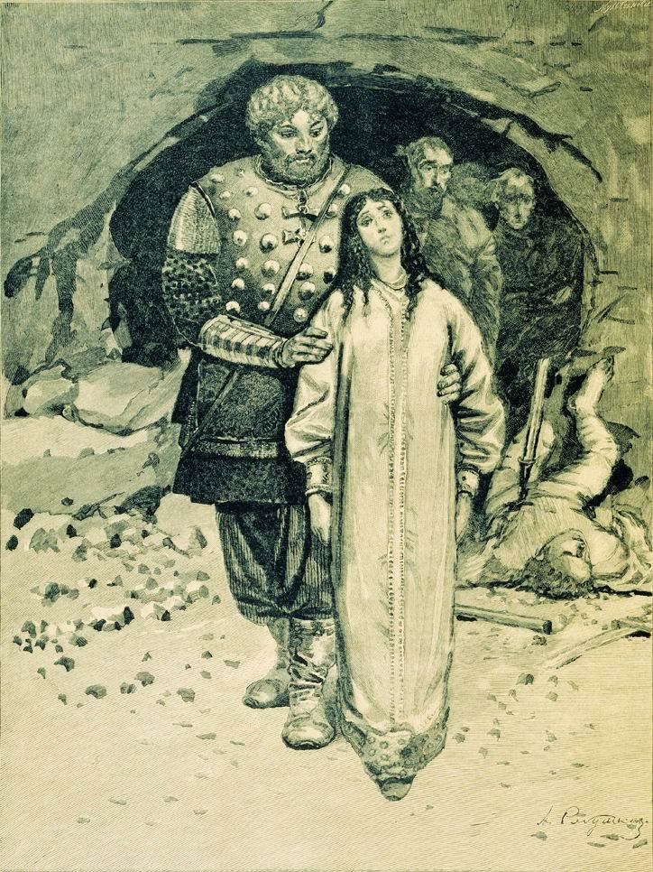 Добрыня Никитич. 1895. Иллюстрация к книге "Русские былинные богатыри"